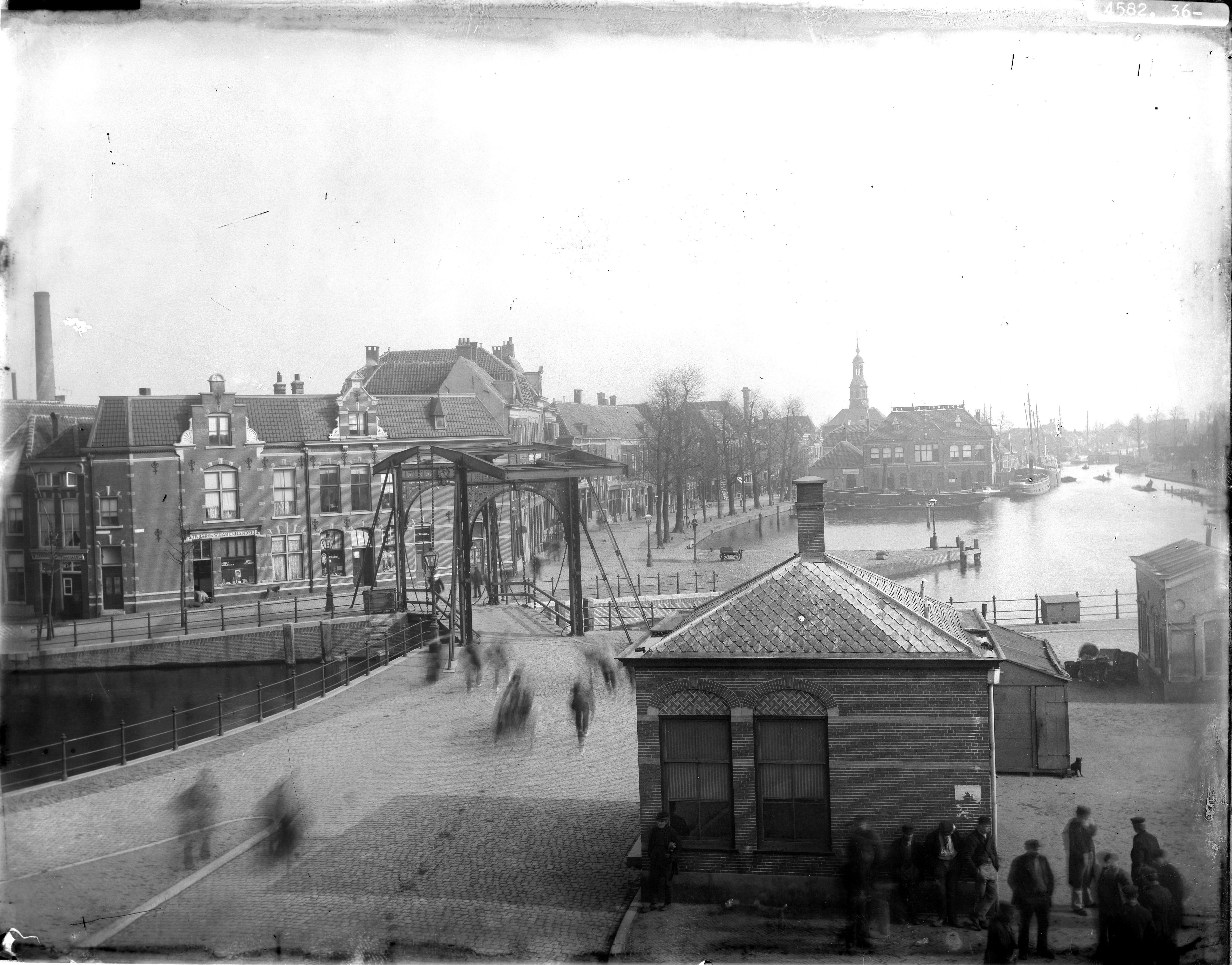 Gezicht op de Haven vanuit een pand aan het Havenplein naar het oosten. Op de voorgrond het Havenplein met de Grote Havenbrug. Links de nrs 2-8. Op de achtergrond nrs 1-3, De Volharding met in het verschiet de toren van de Zijlpoort. Rechts de Oude Rijn met de Schrijversbrug.